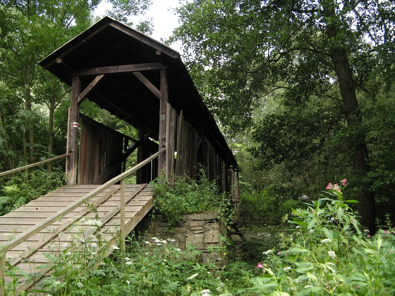 Silniční most - mostek, přes řeku Svratku, v osadě Prudká, Doubravník